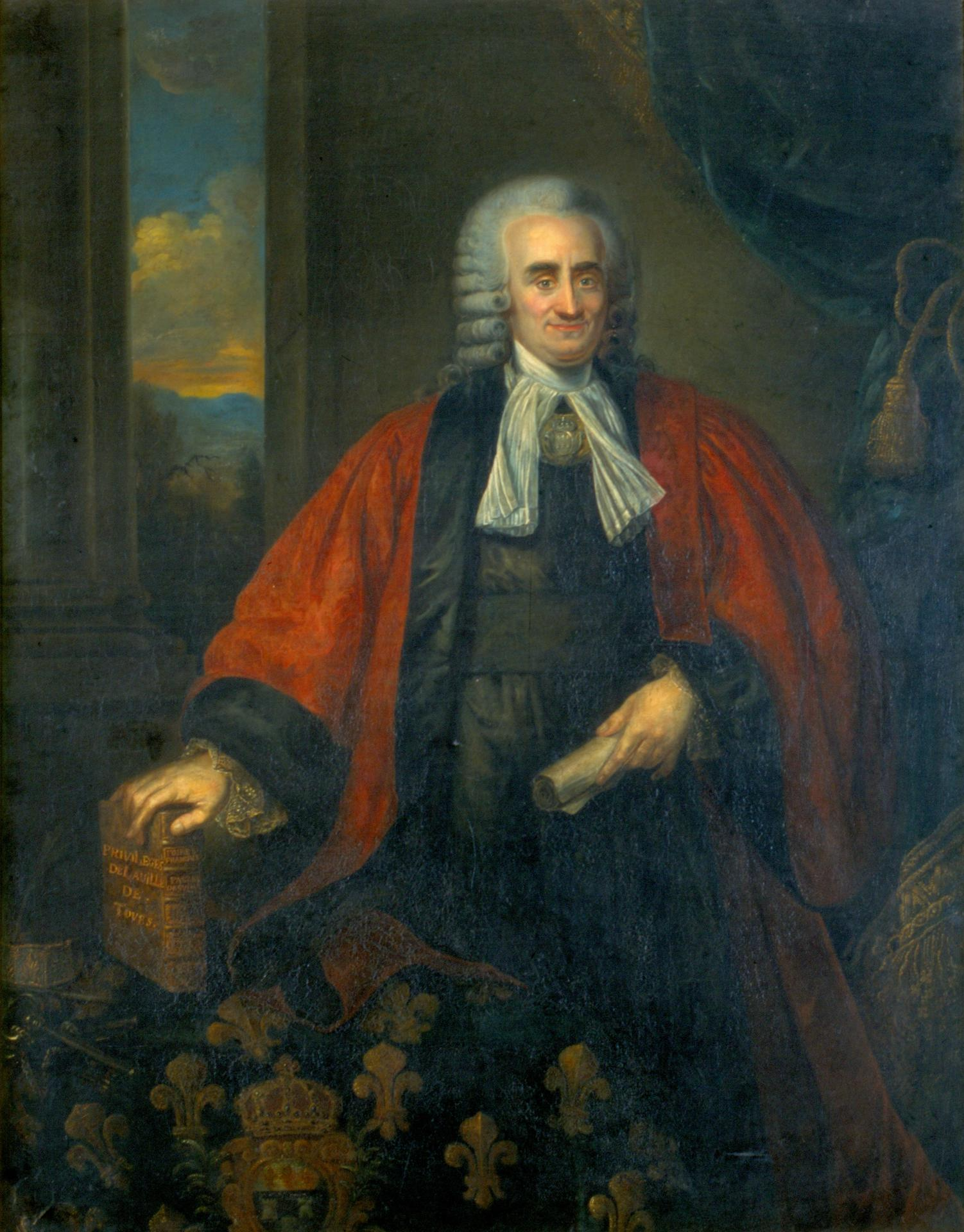 Étienne Benoist de La Grandière (1733-1805)